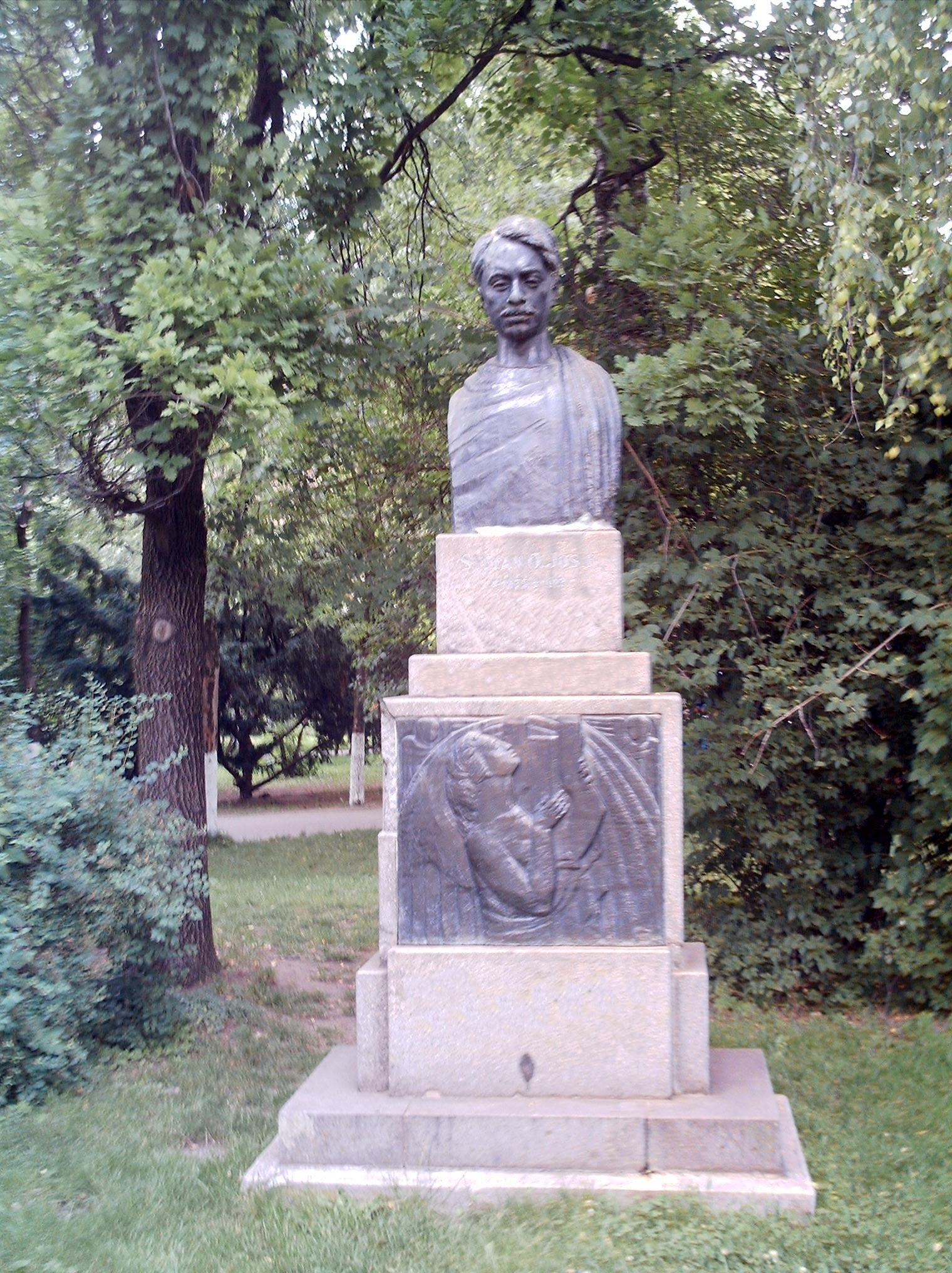 Ştefan Octavian Iosif